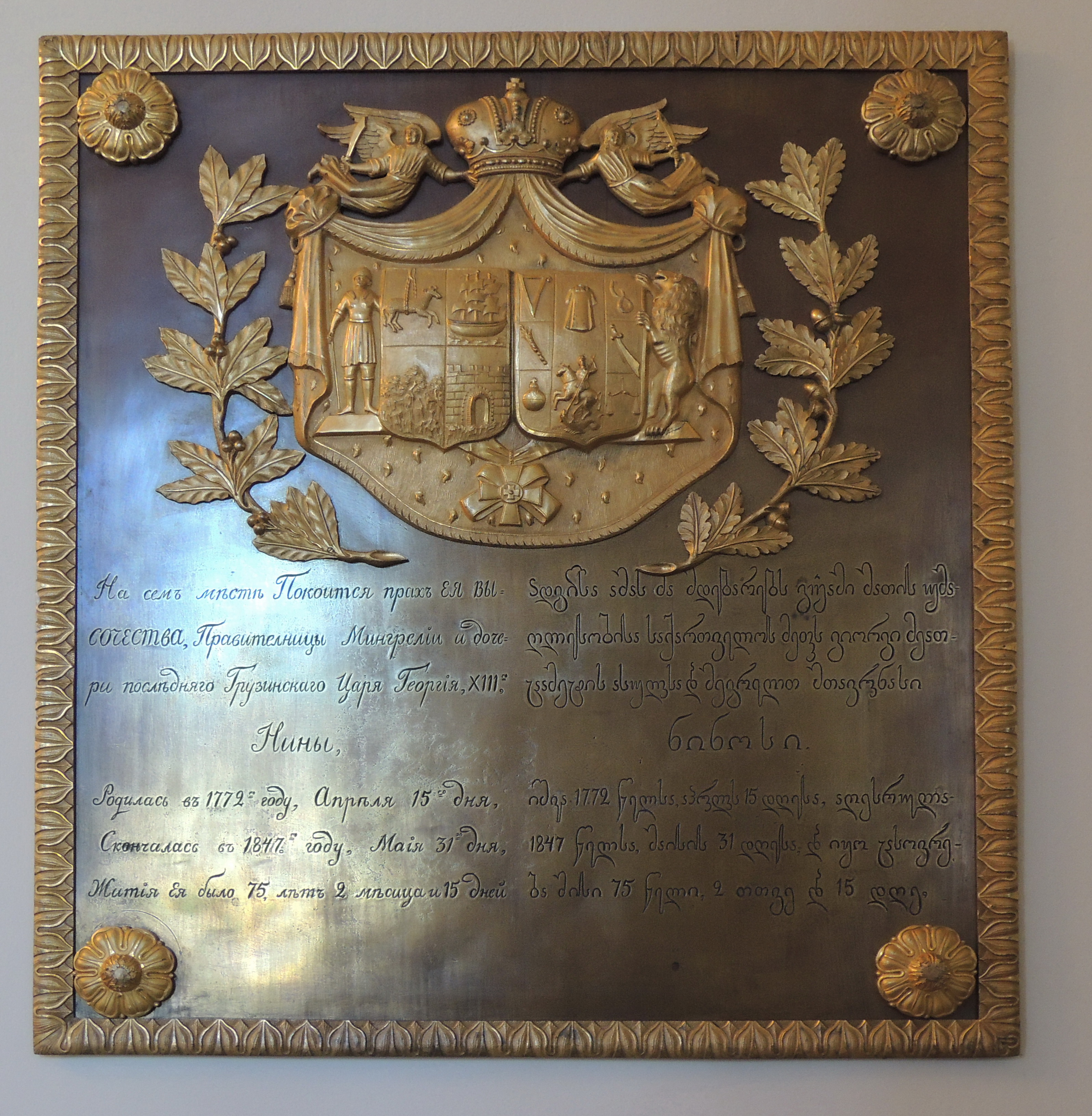 Благовещенская церковь Александро-Невской лавры. Нина, правительница Мингрелии (1772—1847). Дочь грузинского царя Георгия XII, жена Григория Дадиани. Доска с эпитафией. Перенесена из Федоровской церкви в 1930-е гг.